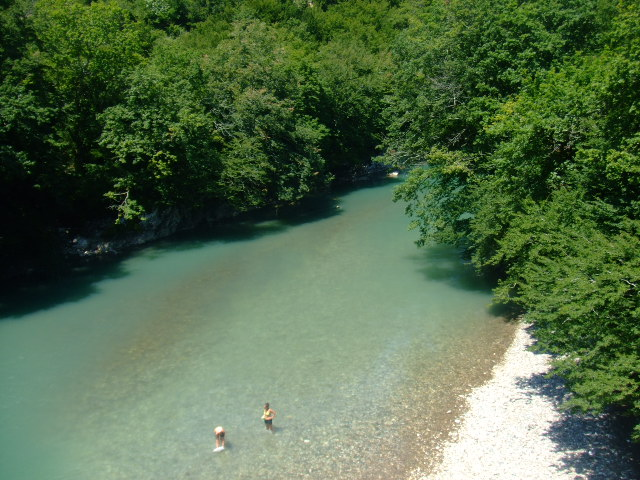 Nokalakevi, river Tekhura